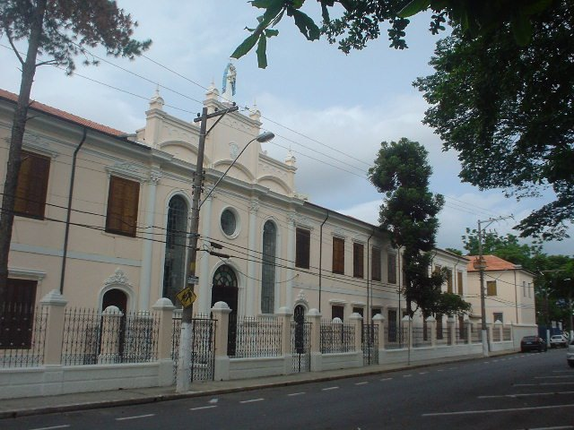 Fachada FMT